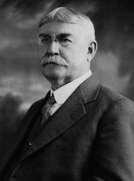 Hector Champagne, parlementaire